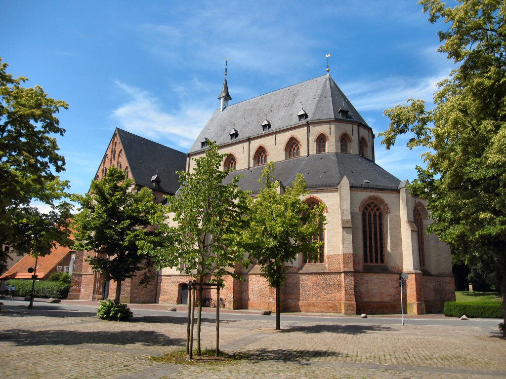 Ludgerikirche in Norden (Ostfriesland)